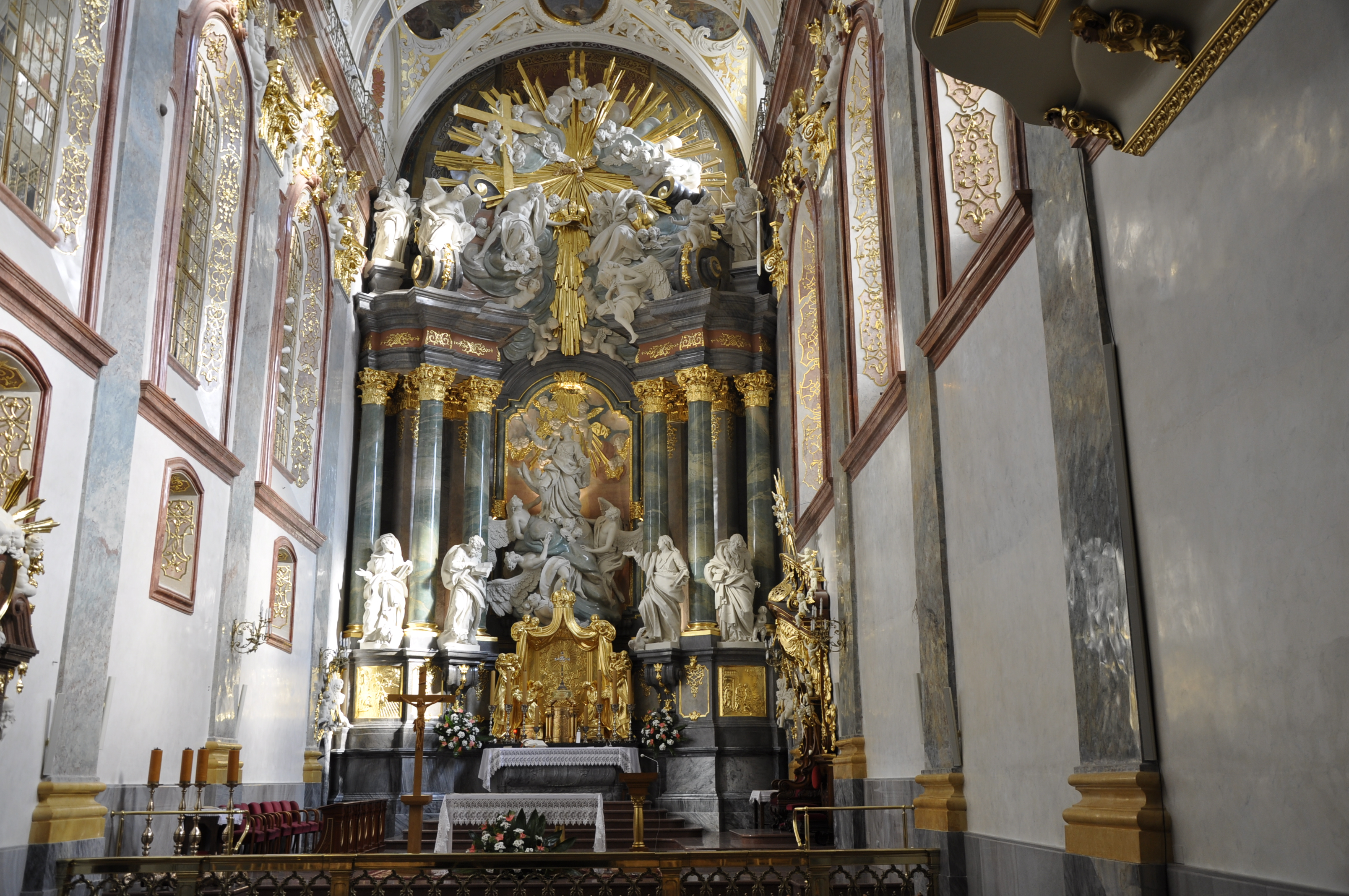 Ołtarz w Bazylice na Jasnej Górze.